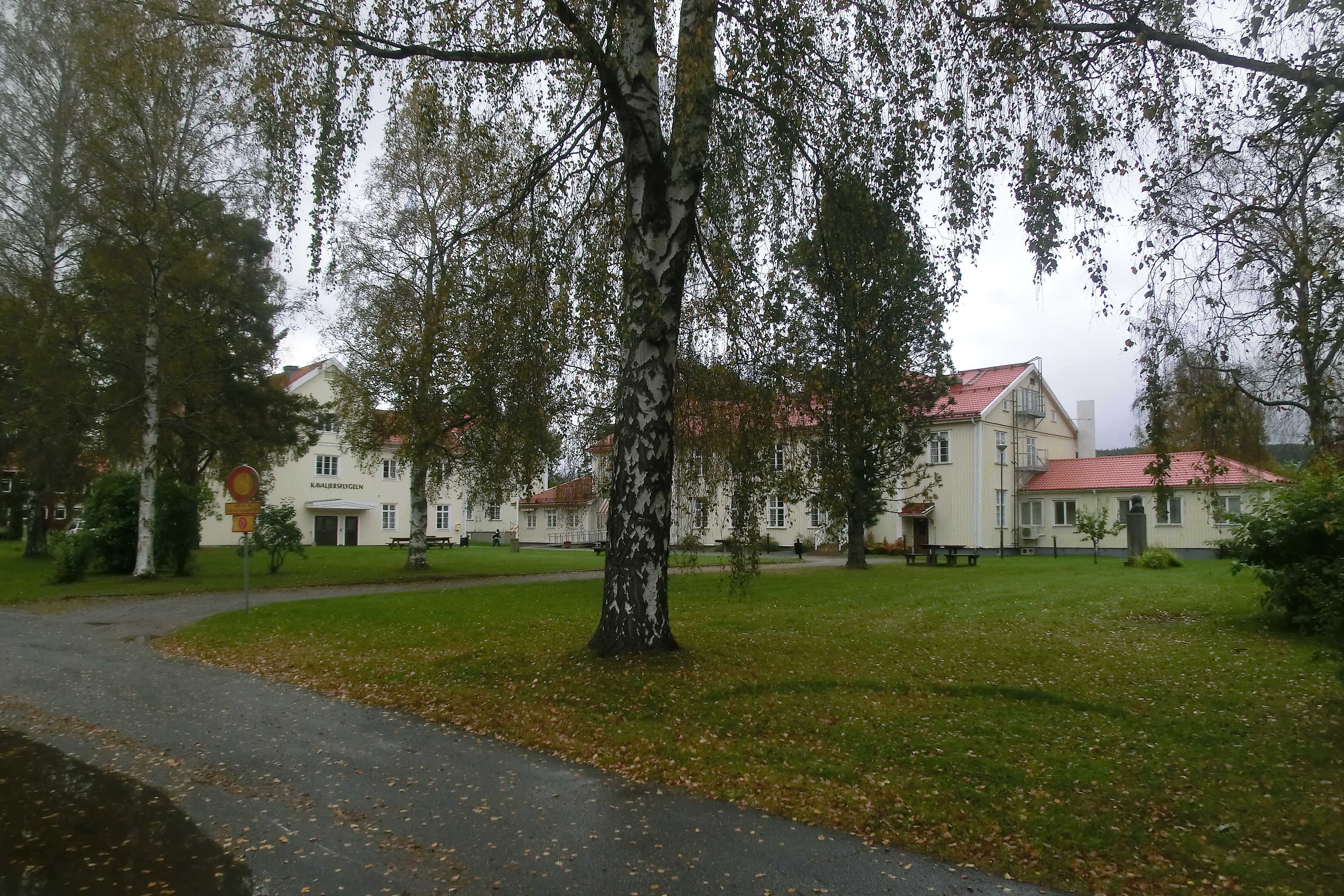 Hola folkhögskola, Prästmon, Ångermanland